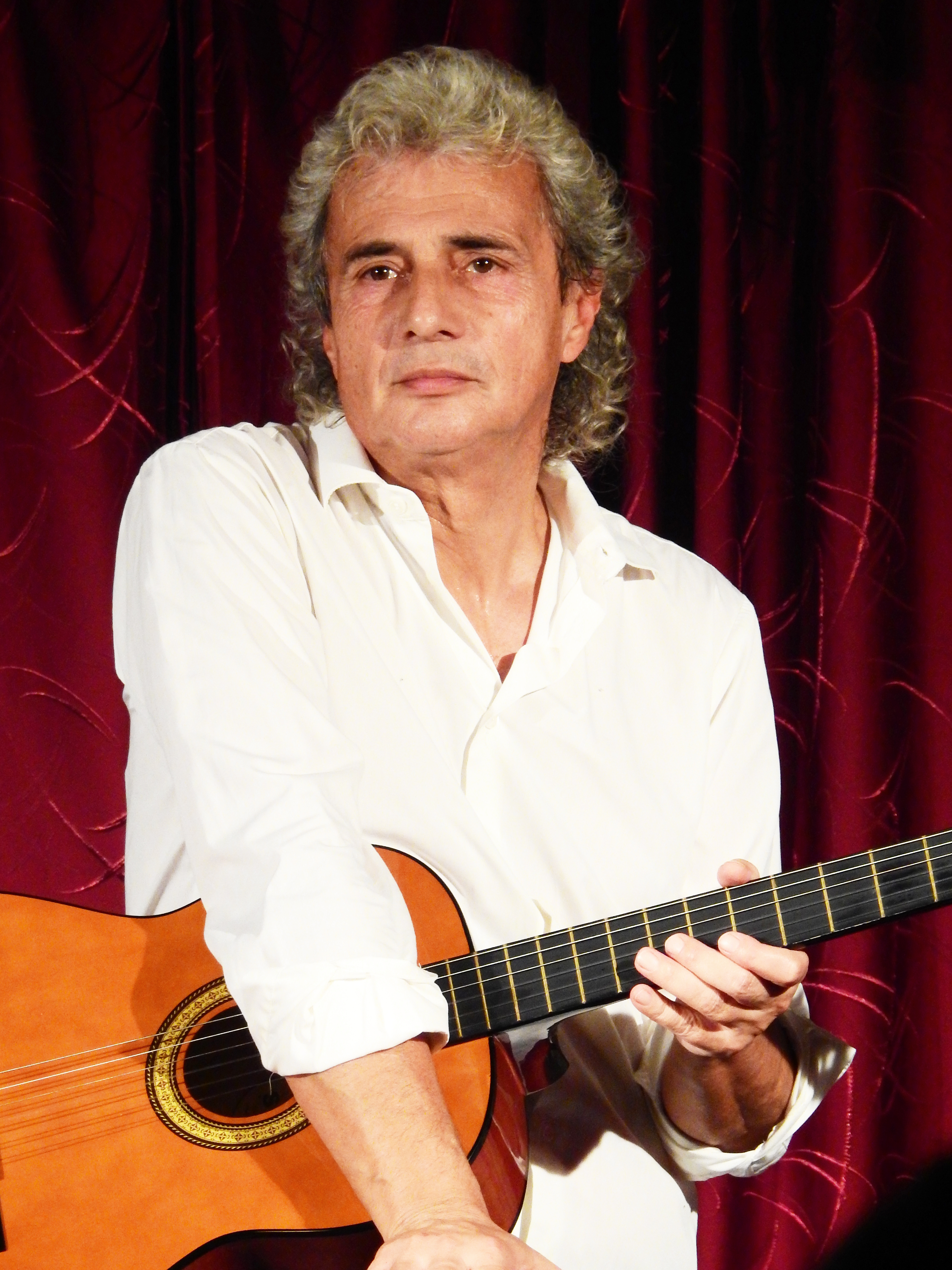 Moravetz Levente Villon-műsora: Villon-Moravetz-40 (Pécs)